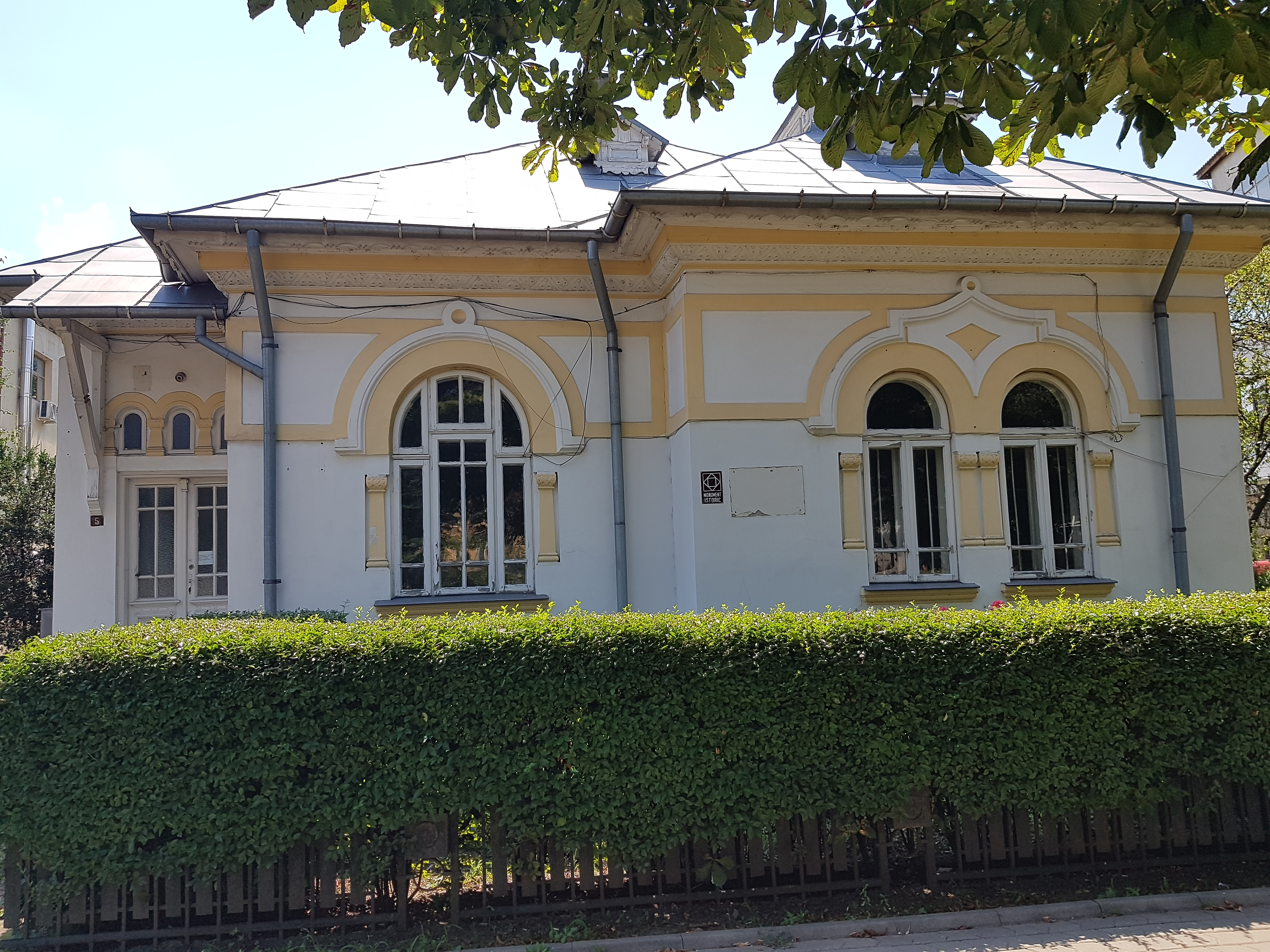 Casa Ștefănescu